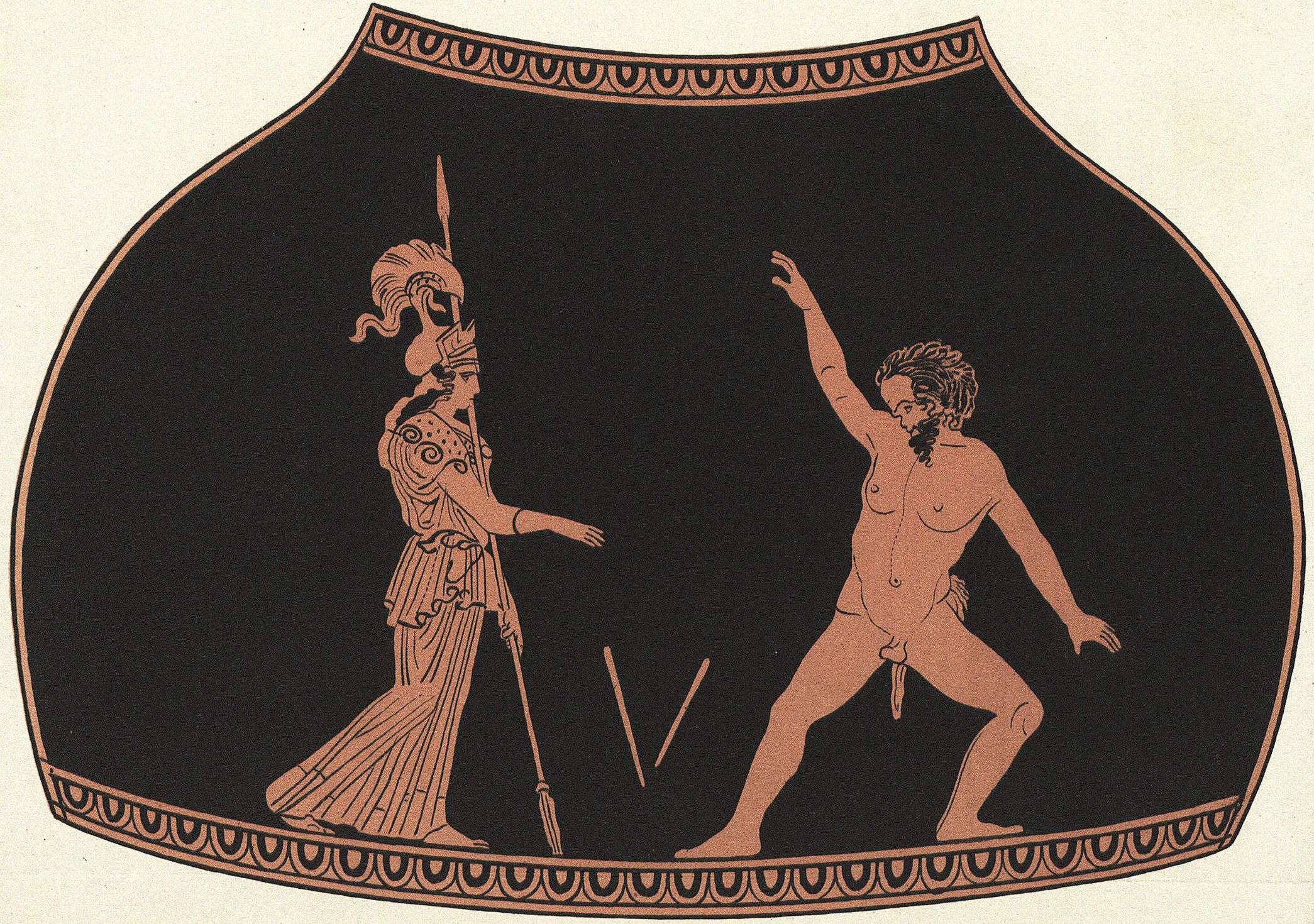 Athene und Marsyas. Reproduktion eines attischen rotfigurigen Vasenbildes im Besitz der Staatlichen Museen zu Berlin (Erstveröffentlichung). Die Vase wurde in Vari (Attika) gefunden